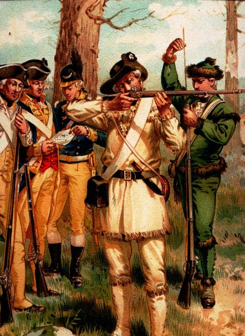 Uniformen diverser Einheiten der Kontinentalarmee, 1776